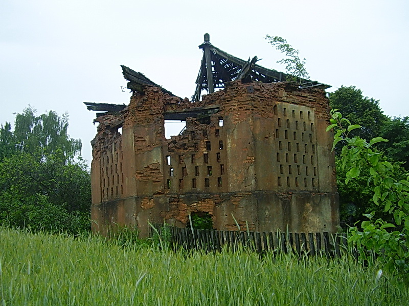 Галынка. Каталіцкая капліца. Свіран-галубятня